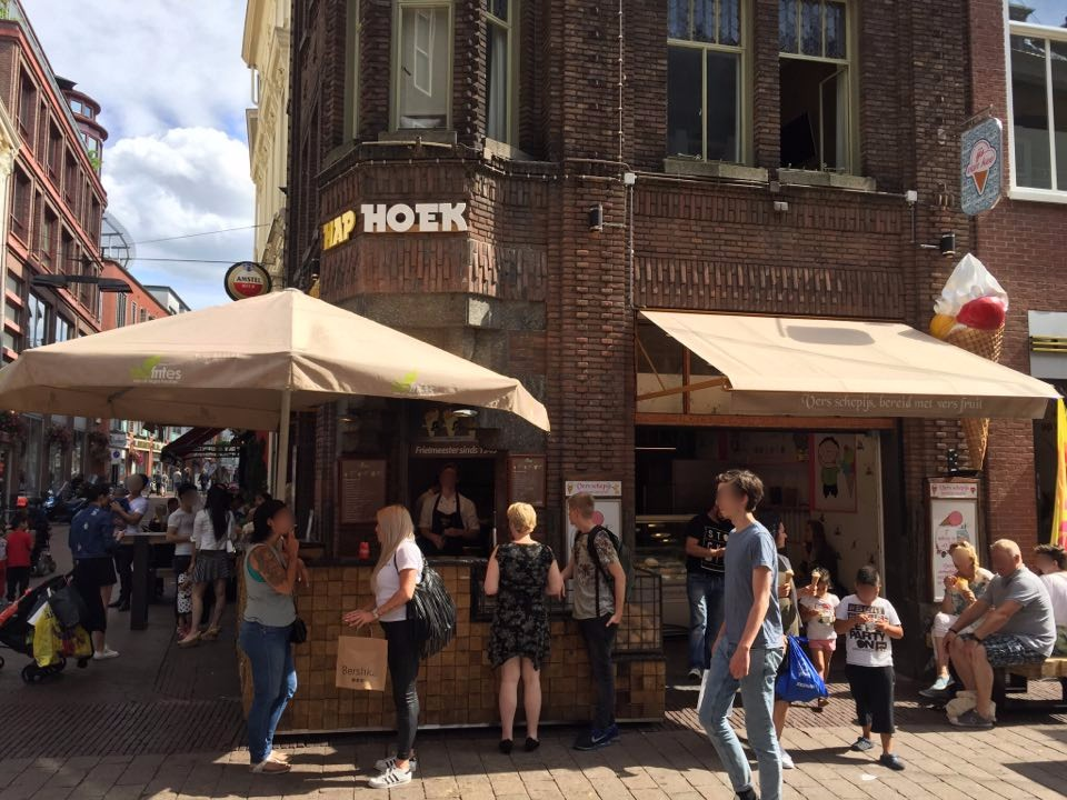 Haphoek, Snackbar van Ratelband.